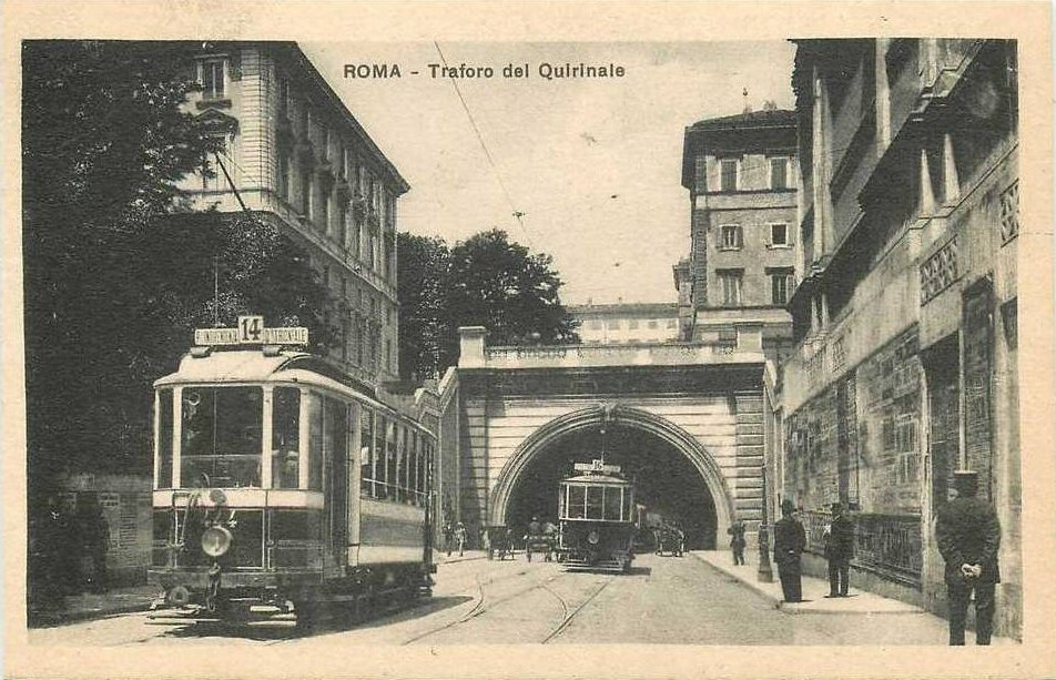 Roma via Milano